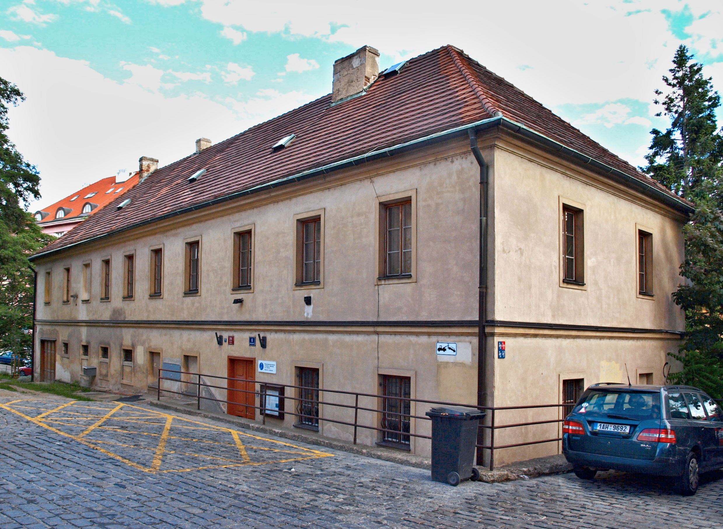 Vršovický Mikuláš